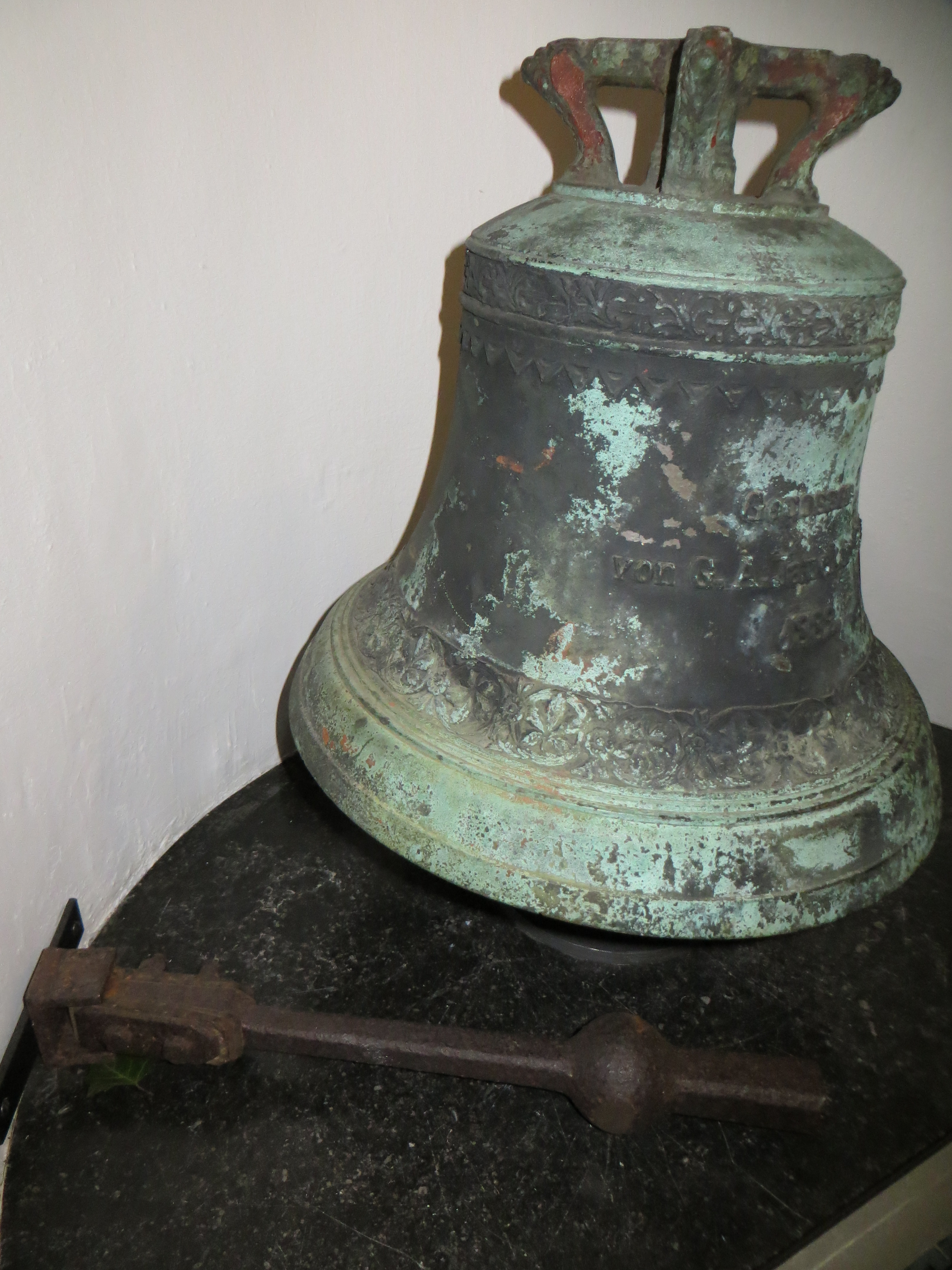 Die Erste Glocke im Dachreiter der DIAKO-Kirche, 1882 gegossen von G.A. Jauck in Leipzig, Bild 02; ersetzt im Mai 2010